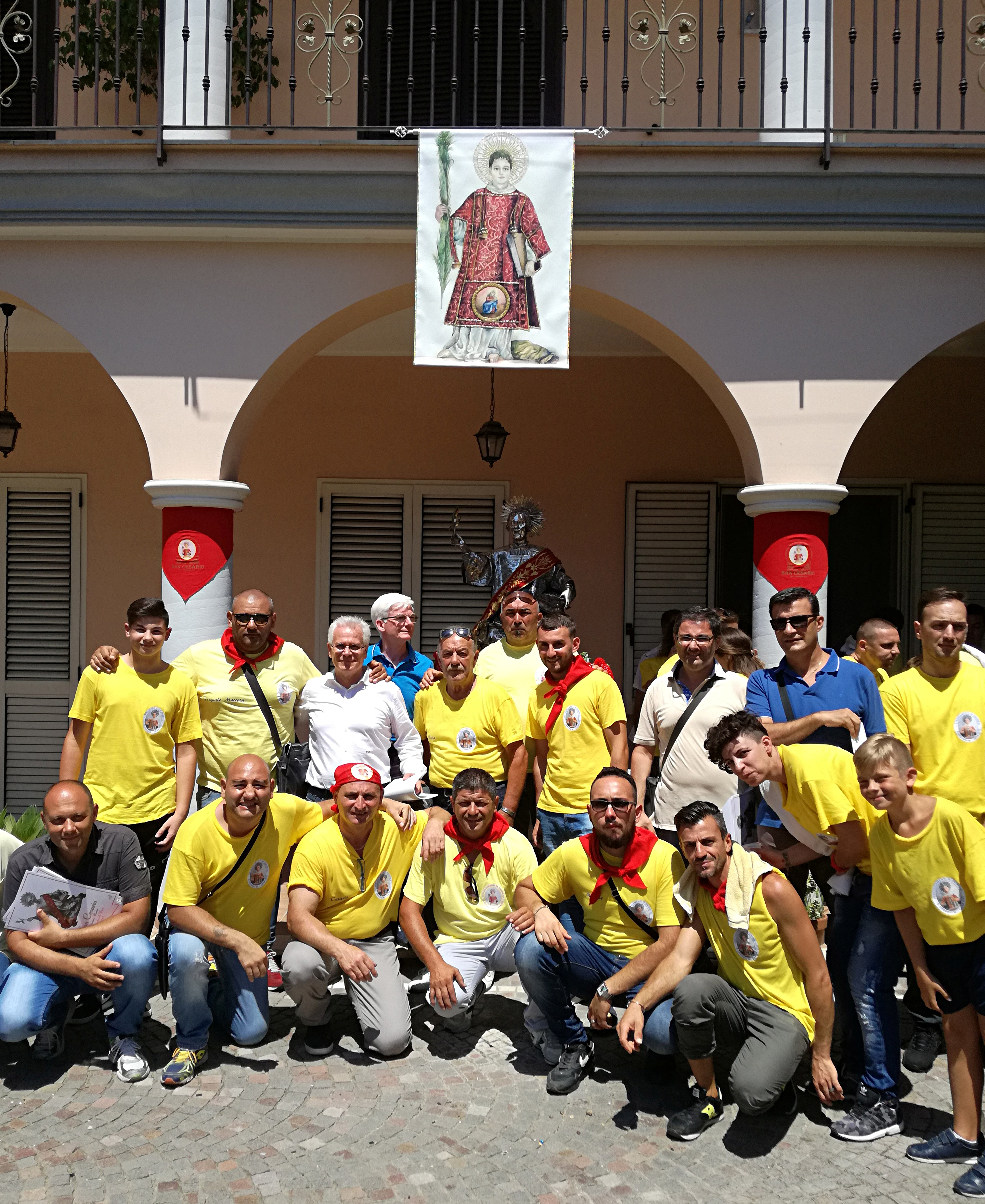 Portatori della statua argentea di San Cesario, Cesa